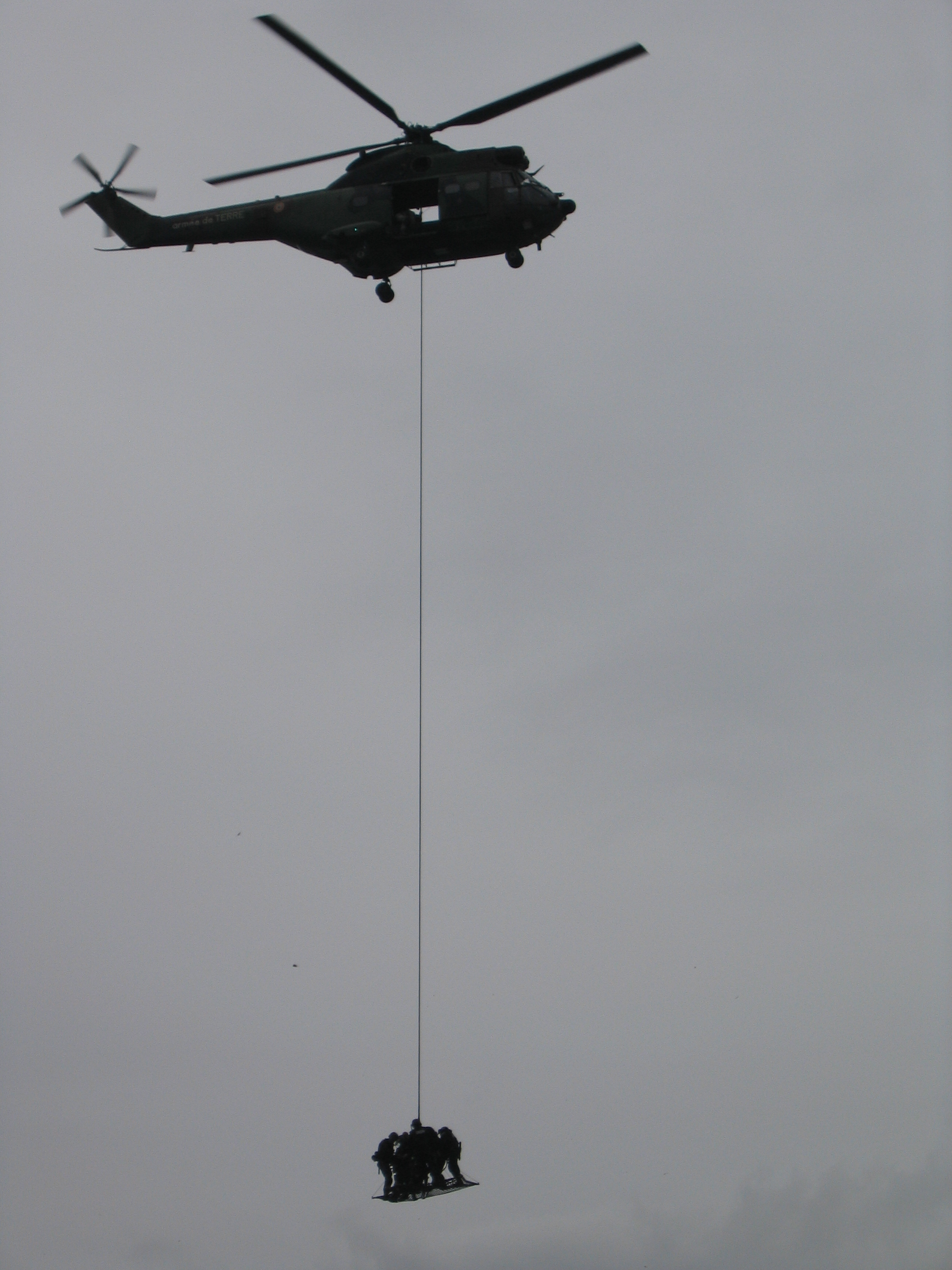 Démonstration d'hélitreuillage du GIGN lors des journées de sécurité intérieures 2009 sur l'esplanade des Invalides.